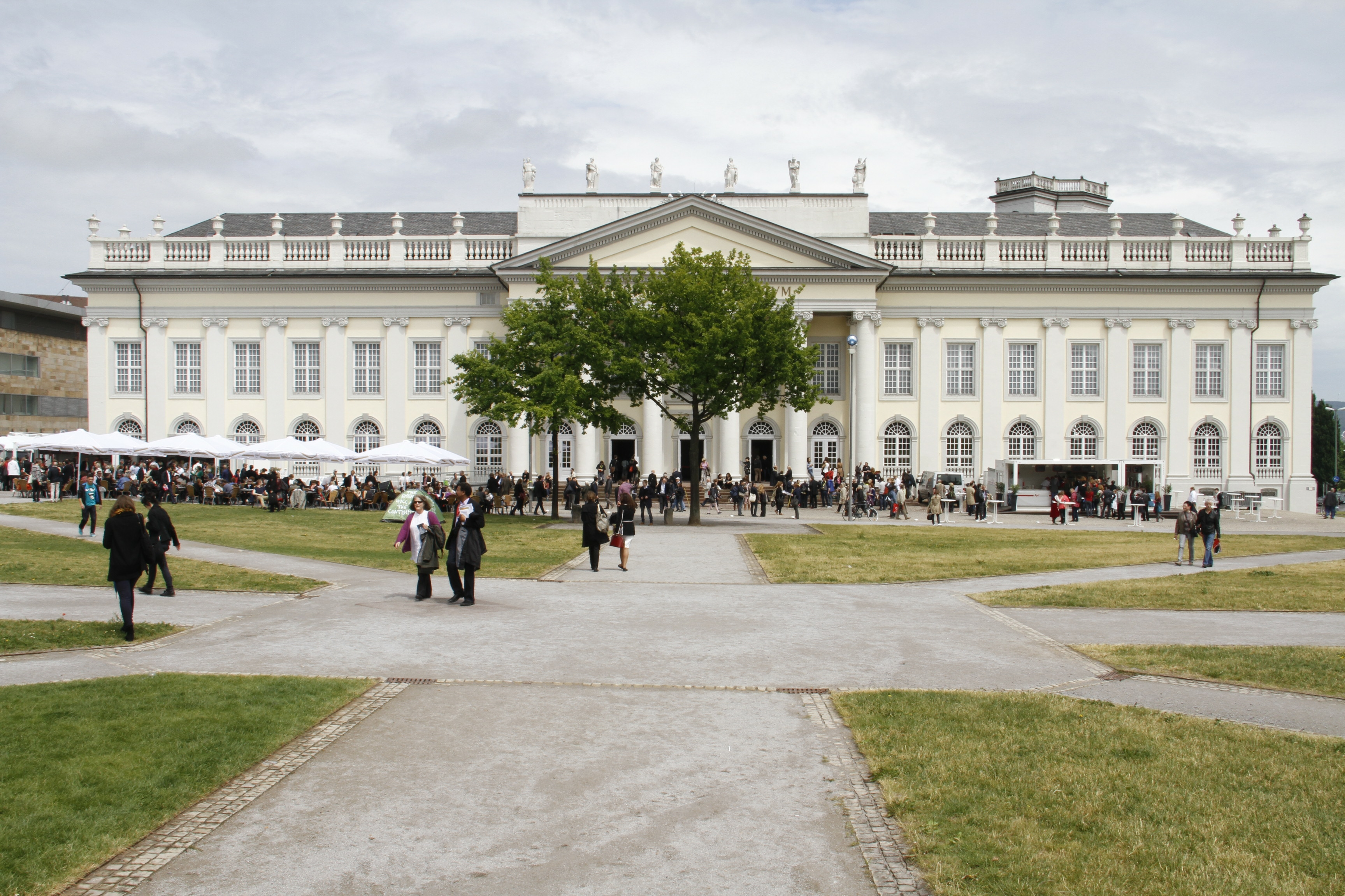 dOCUMENTA(13) Veranstaltungsgebäude Fridericianum